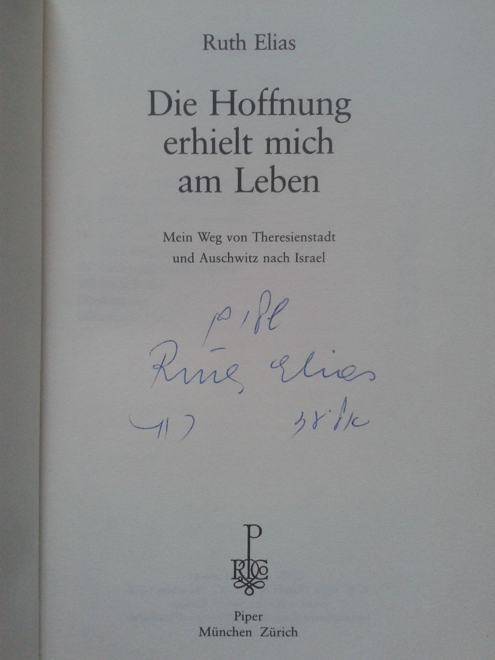 Аҧсшәа: Ruth Elias: Unterschrift in: Die Hoffnung erhielt mich am Leben. München, Zürich 1988.